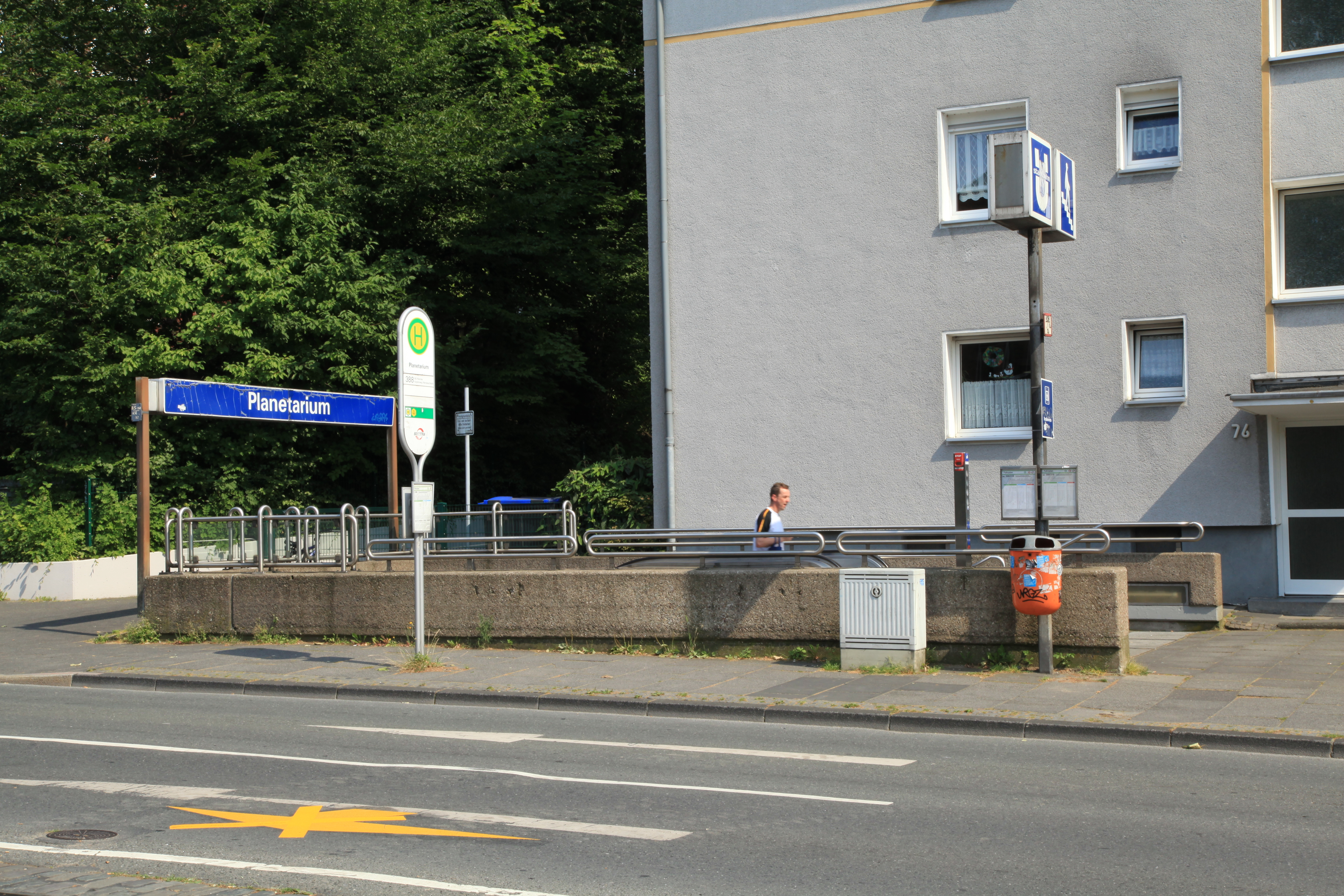 Castroper Straße in Bochum